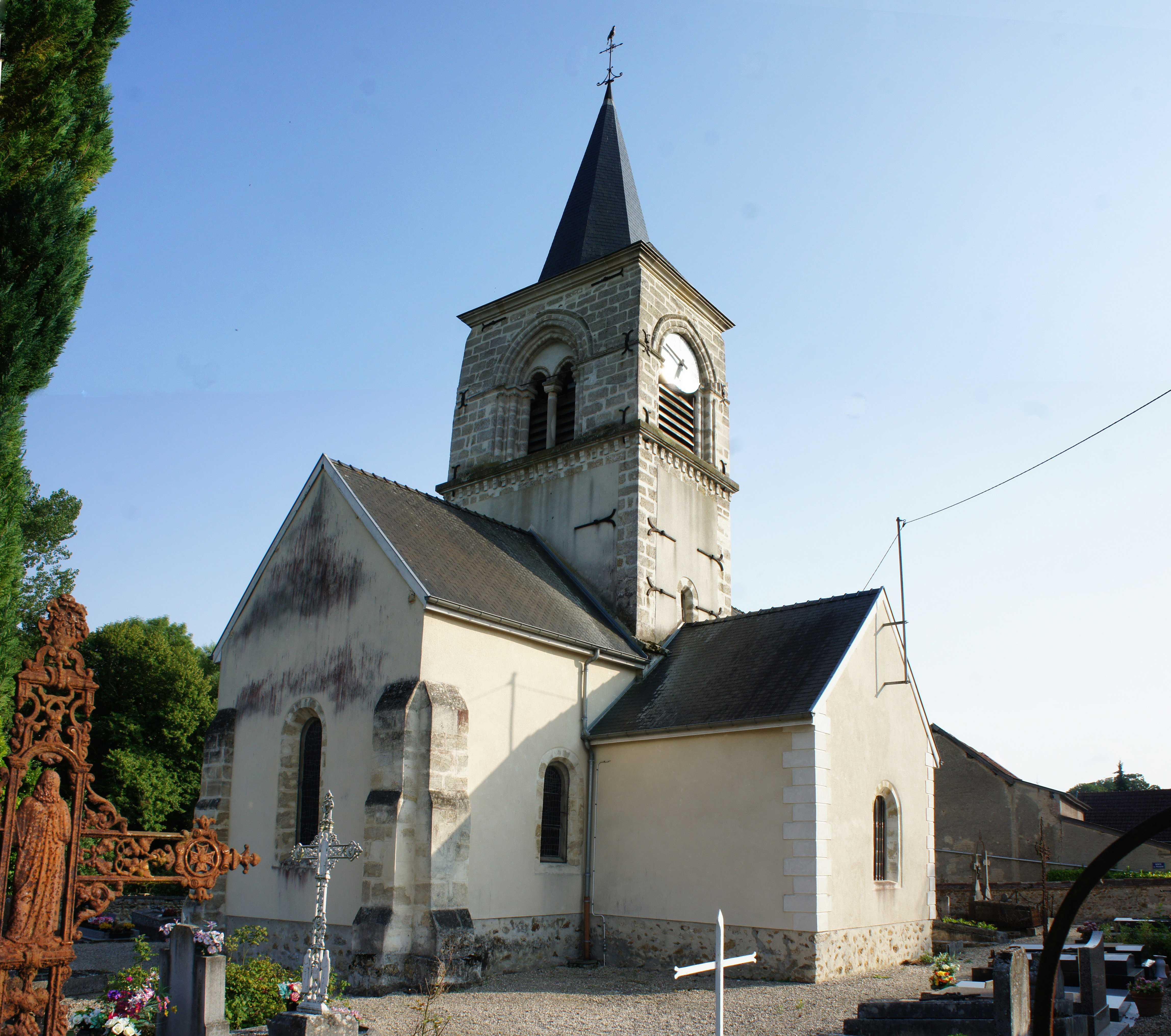 Vue de Tauxières-Mutry . Bras nord de l'église .